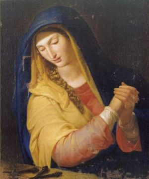 L'Addolorata, olio su tela, Museo regionale, Messina